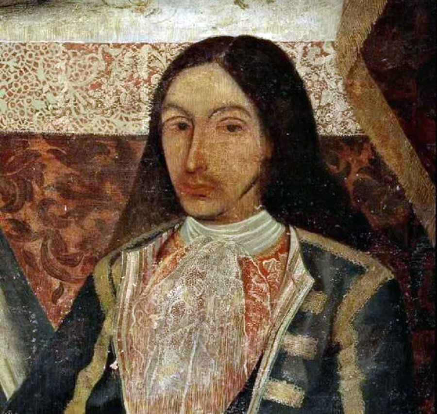 Detalle del lienzo «Cristo de la Humildad y Paciencia» de la Ermita de Nuestra Señora del Rosario, en el que aparece Amaro Pargo